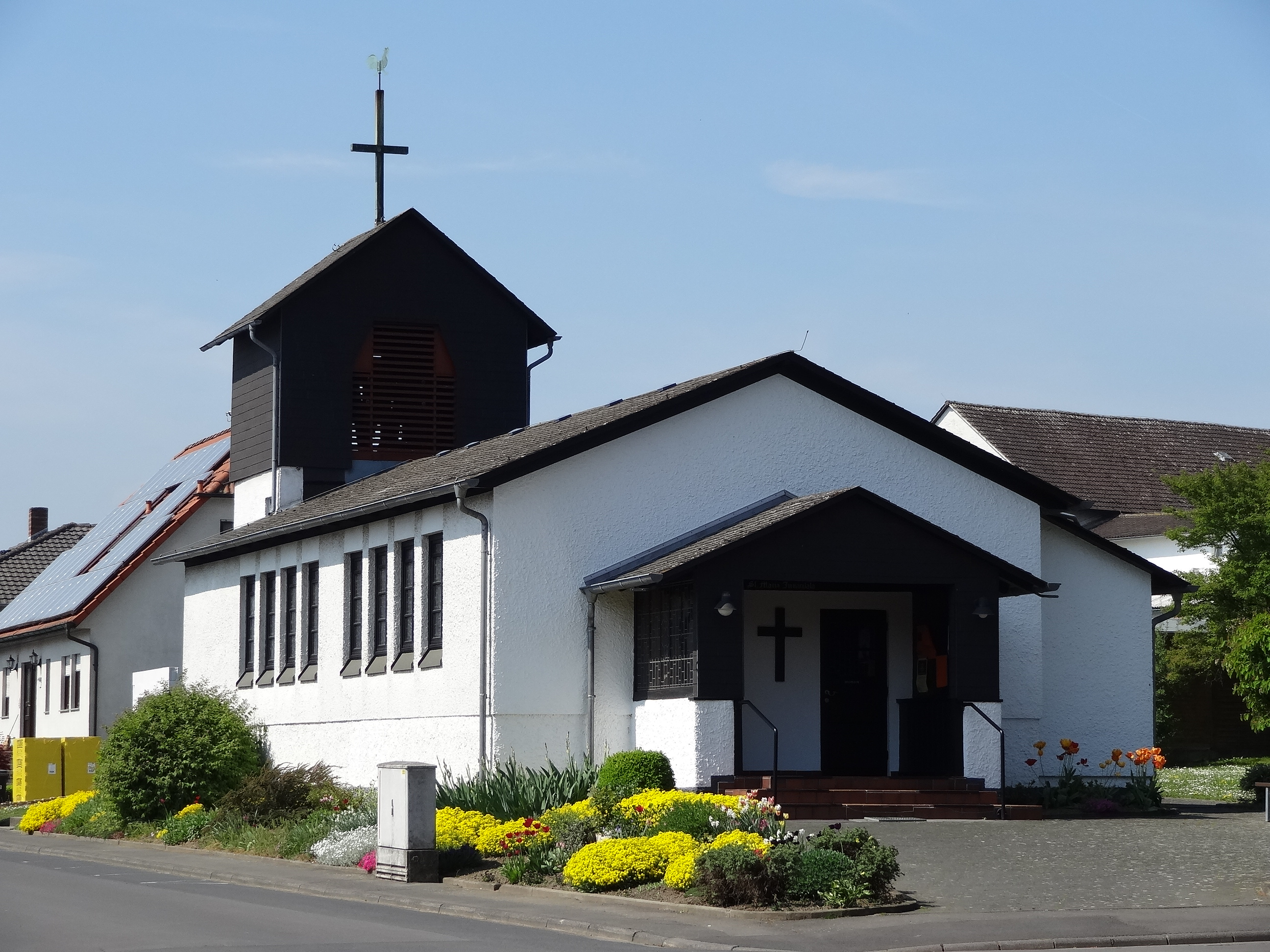 St. Maria Immaculata (Lich)